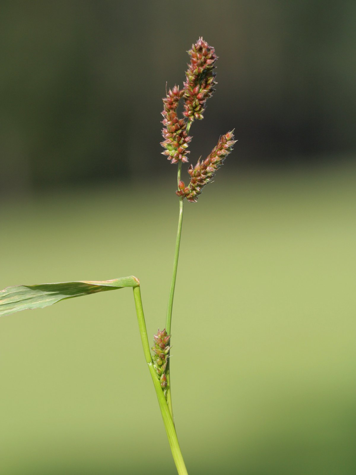 Gewöhnliche Hühnerhirse (Echinochloa crus-galli)